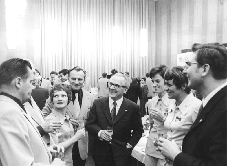 ADN-ZB-Koard-27.10.1972-bi-Berlin: Auszeichnungen für Mitglieder des DDR-Olympiakollektivs im Amssitz des Staatsrates am 27. Okt. 1972. Siehe ADN-Meldung - Ein herzliches Gespräch führten nach der Auszeichnung Erich Honecker (m.), Werner Lamberz (r.), Manfred Ewald (l.), Dr. Heinz Schöbel (dahinter verdeckt), Karin Janz, Rudi Hellmann (rechts daneben), Renate Stecher (2.v.r.) und Karin Balzer (3.v.r.).